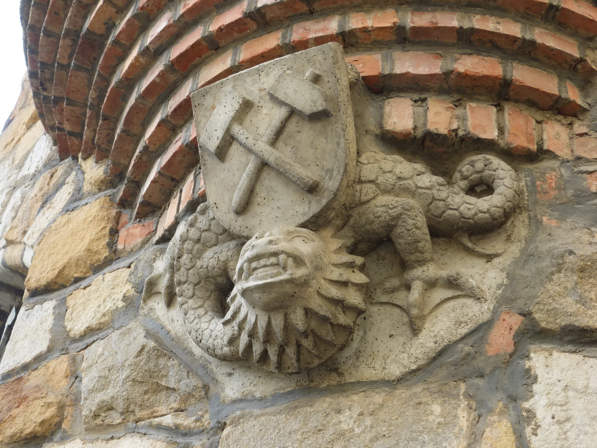 Bergmannswappen und Tatzelwurm am ehemaligen Verwaltungsgebäude der Bayerischen Braunkohlen Industrie AG in Wackersdorf (Oberpfalz)